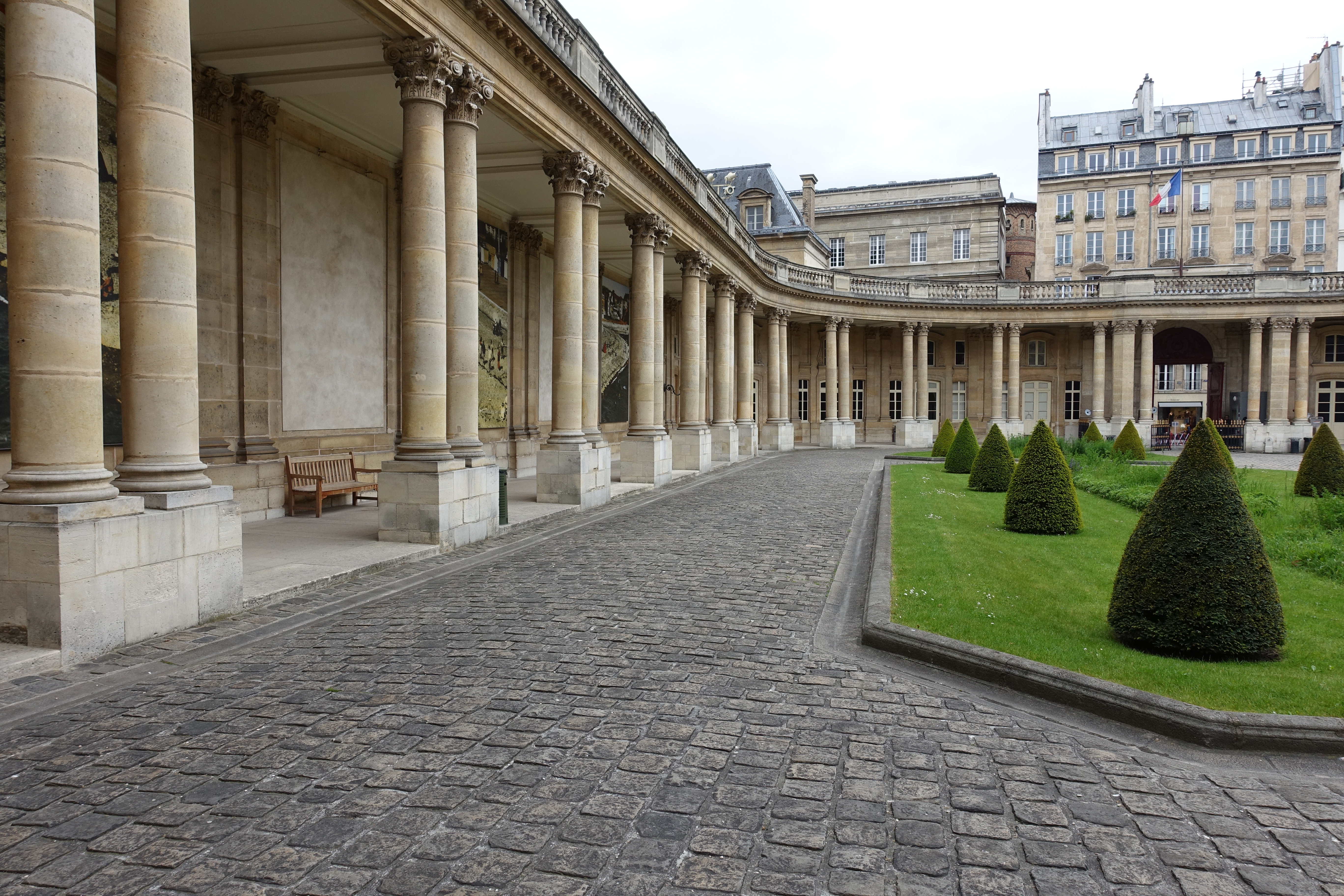 Archives nationales, Paris, France.